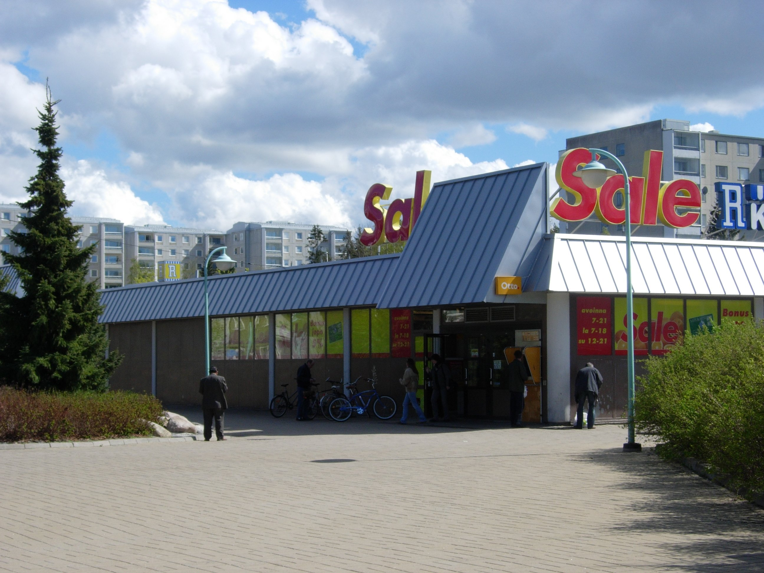 Lausteen keskus